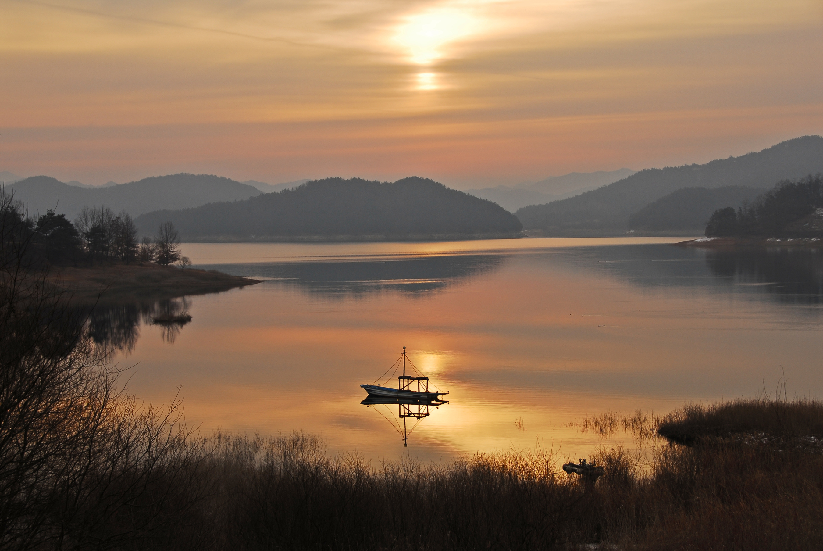 대청호오백리길 1구간_2